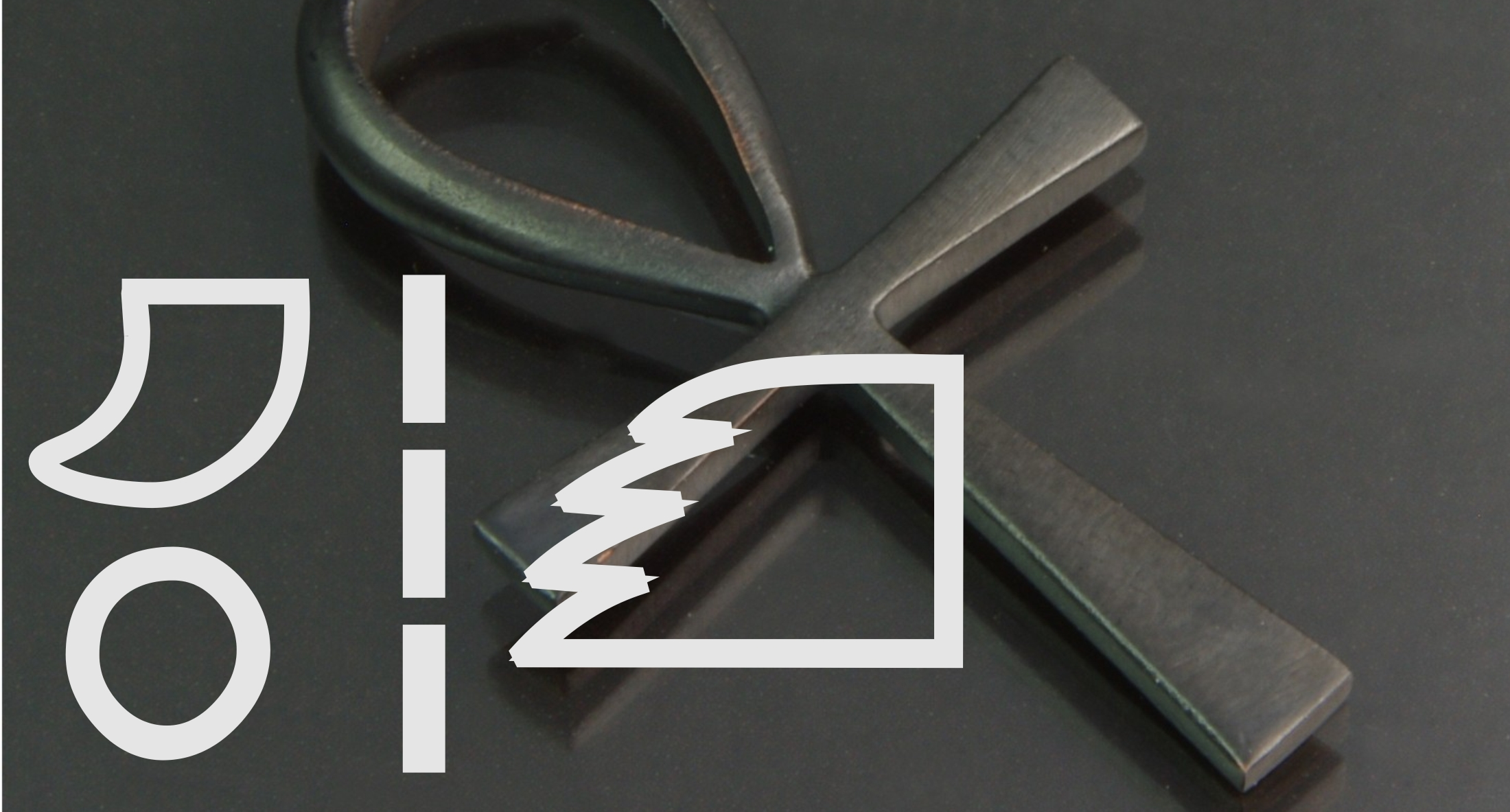 Hintergrundbild bei Namensnennung gestattet: Ankh-Replik aus Corinthium aes der Manufaktur Markus Eckardt (Ensdorf, Glyphen nachgetragen.